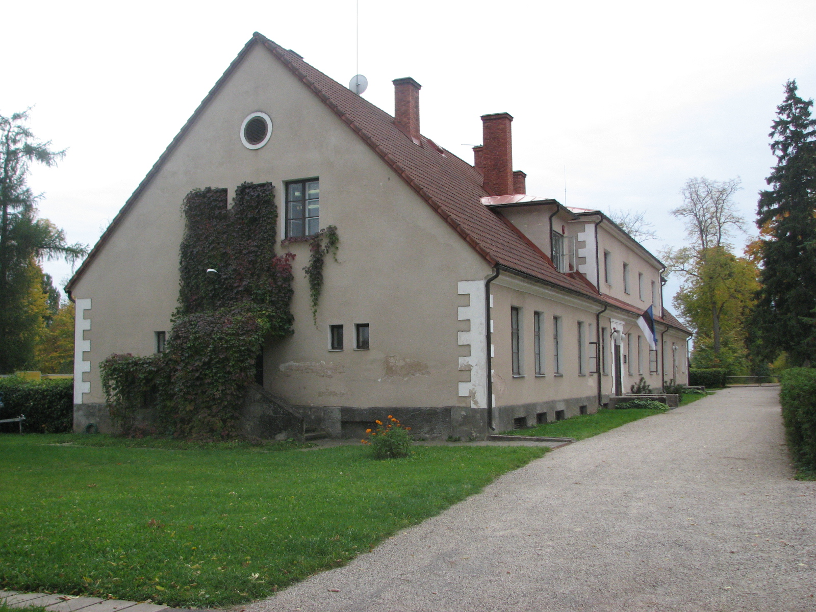 Aakre manor, Estonia